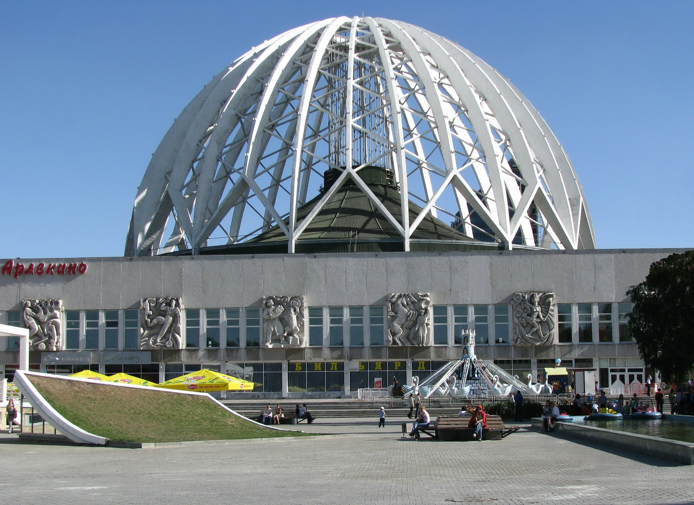 Екатеринбургский цирк